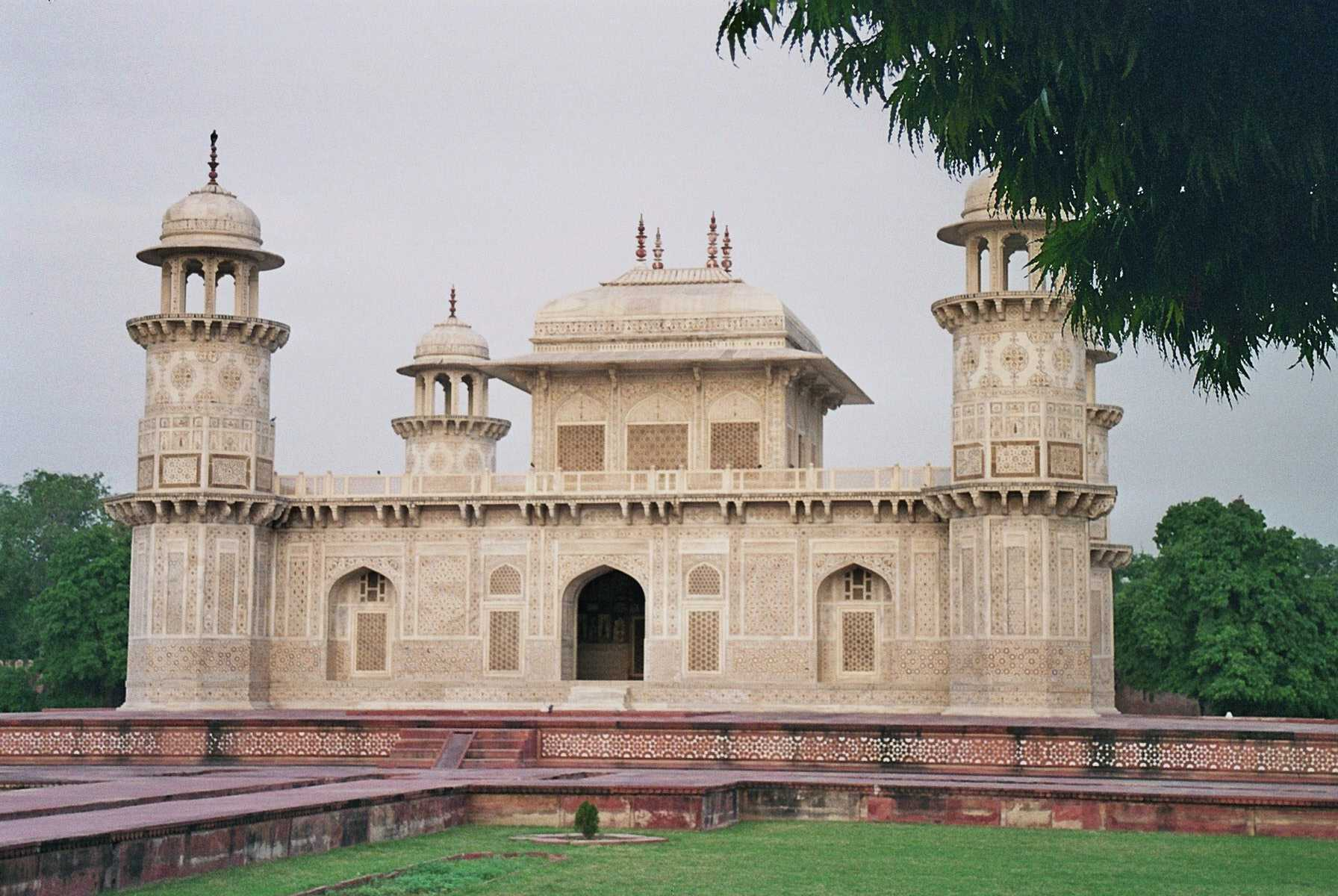 Mausoleo de Itimad-Ud-Daulah, Agra (India) Itmad-Ud-Daulah's Tomb, Agra (India) Picture taken by Núria Pueyo, august 2005